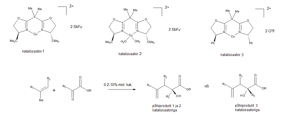 Kiraalsed Cu(II) katalüsaatorid een-reaktsiooni jaoks